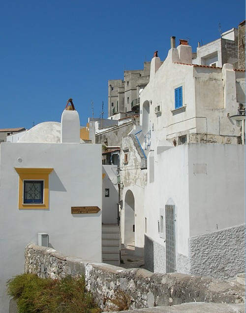 Peschici Eigenwerk